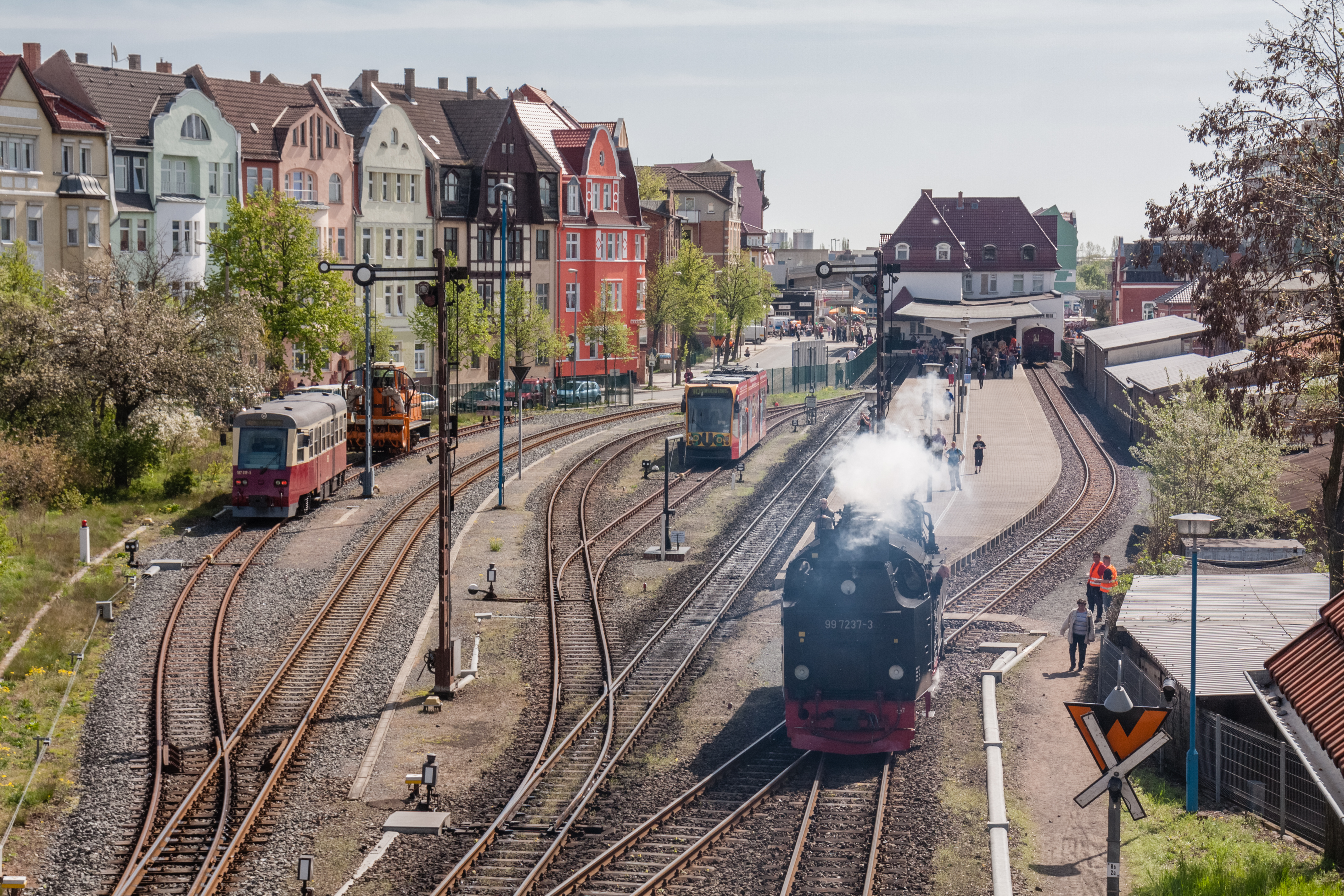 Bahnhof Nordhausen Nord